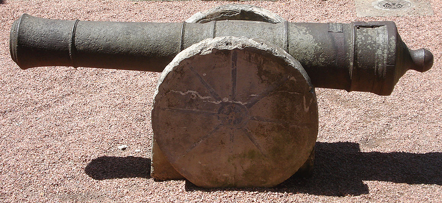 Canhão Farroupilha, Museu Júlio de Castilhos, Porto Alegre, Brasil.